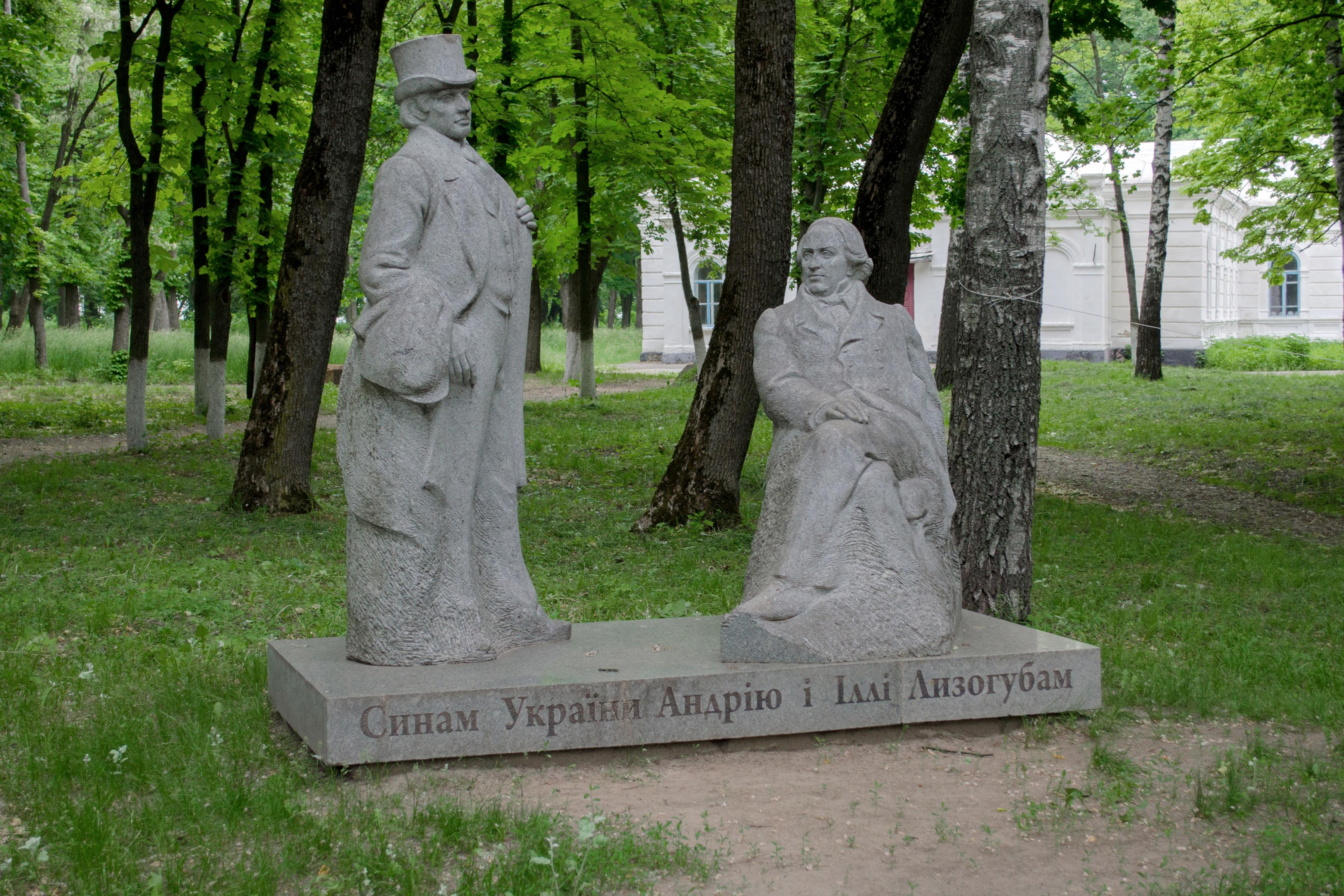 Пам’ятник Лизогубам Андрію та Іллі, Седнів, на території садиби Лизогубів